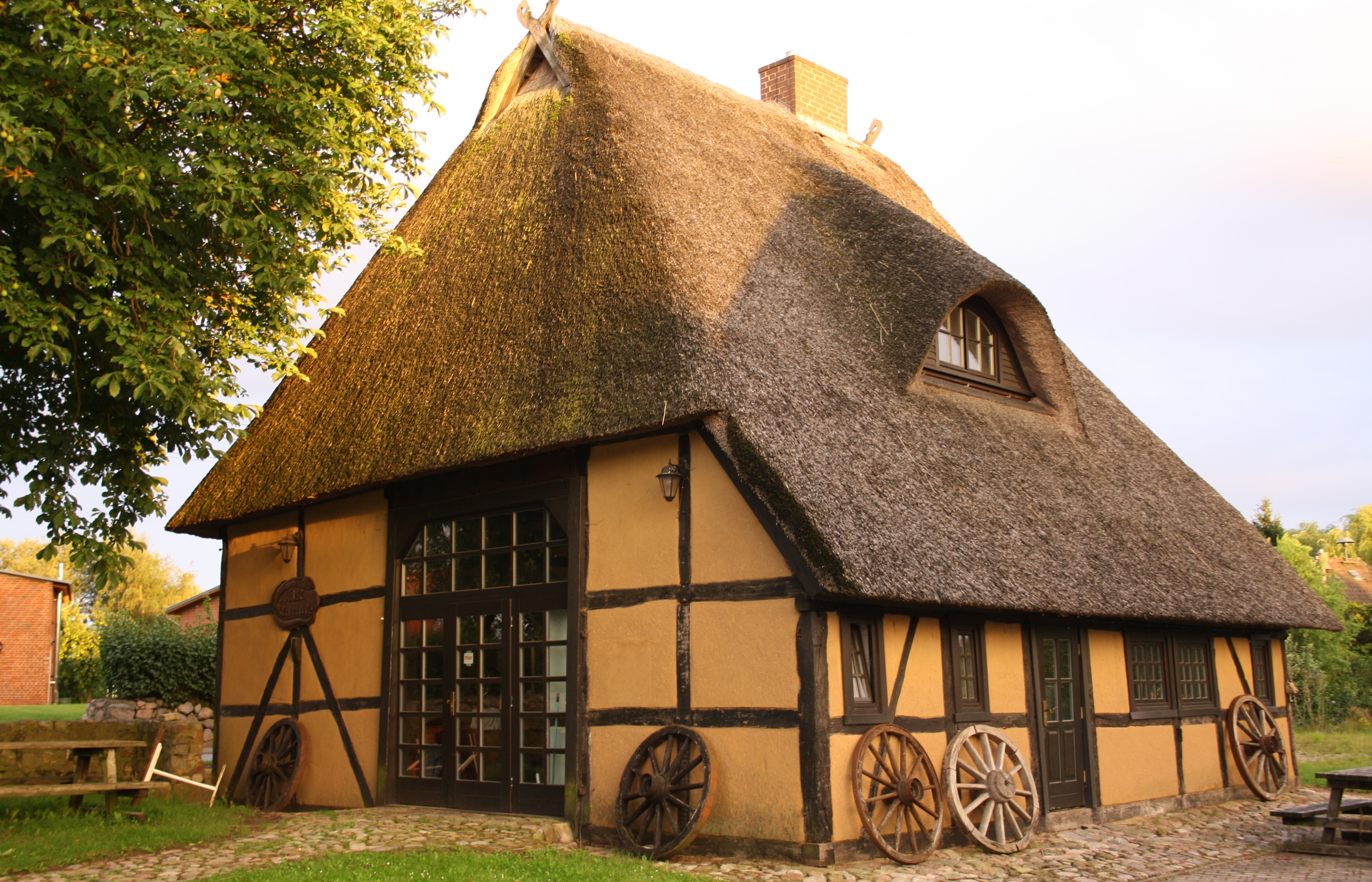 ehemaliges Fischrestaurant